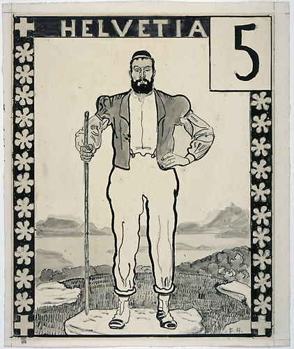 Projet pour le timbre-poste de 5ct : armailli fribourgeois. Mine de plomb, pinceau et lavis d’encre de Chine, 425 x 355 mm